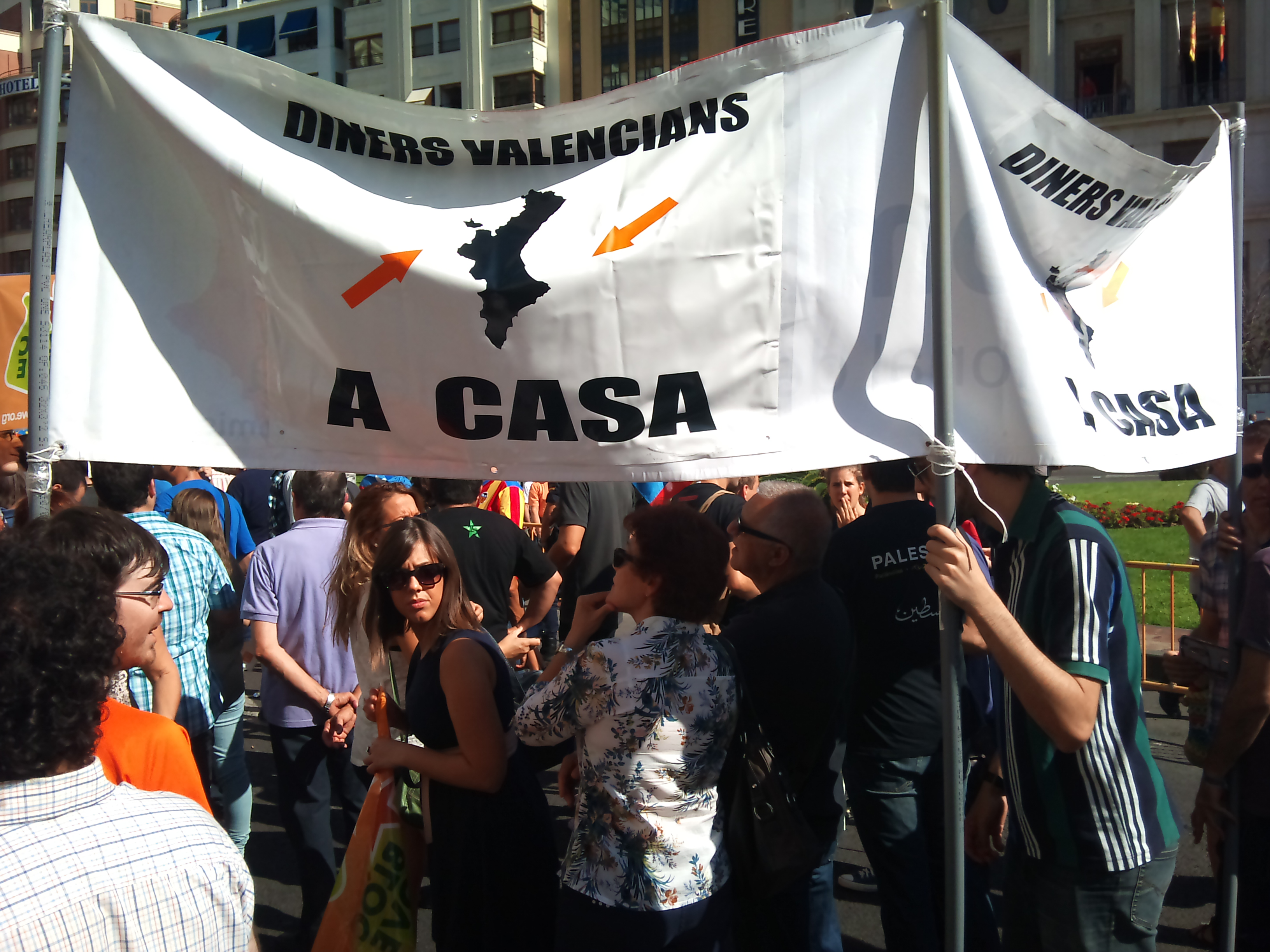 Pancarta "Diners Valencians, vos volem a casa", del BLOC Jove